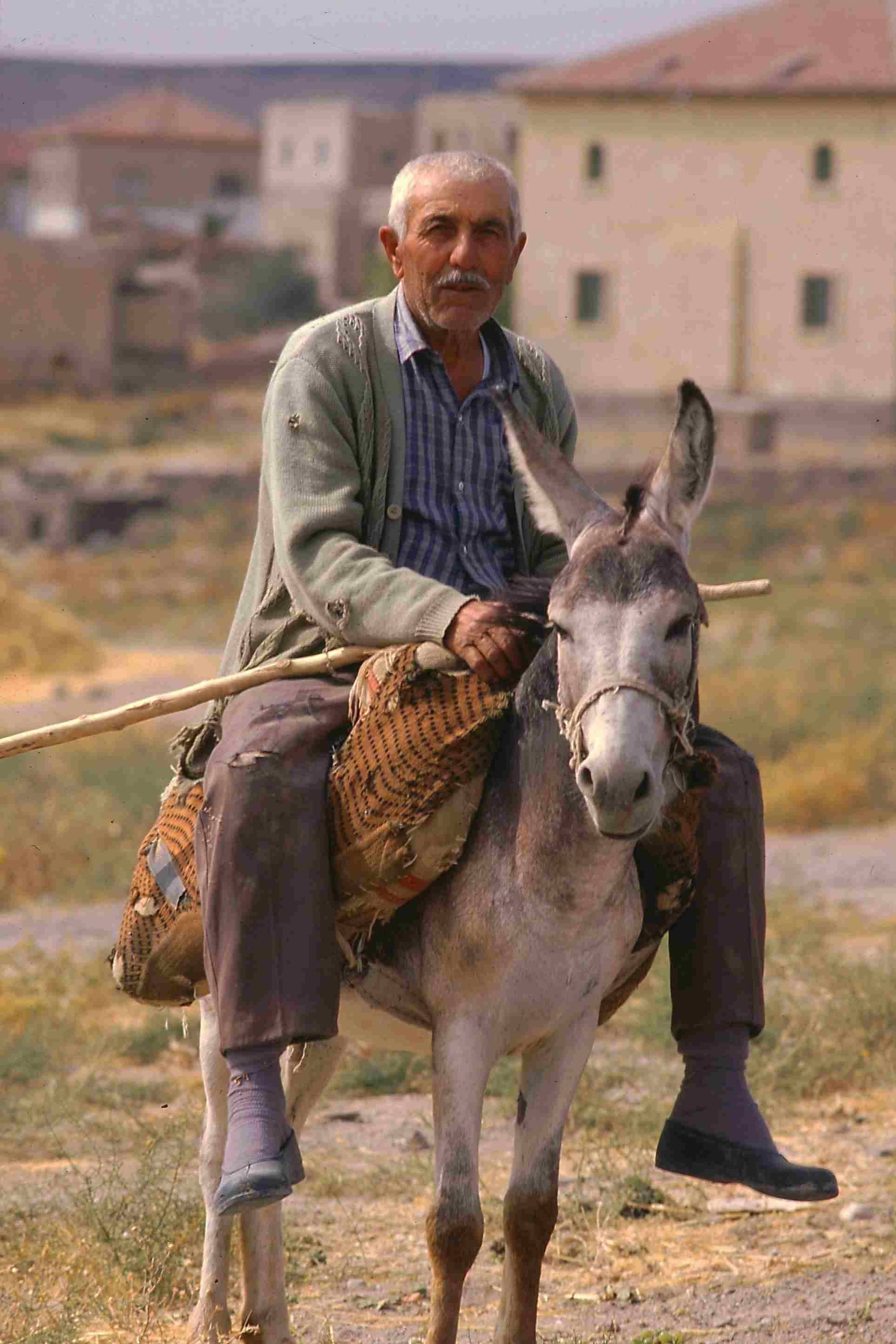 Un paysan et son âne en Cappadoce - Turquie